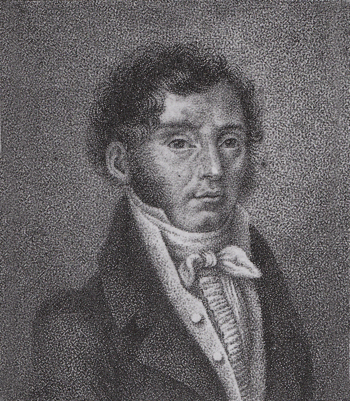 Antonio Morrocchesi (1768-1838), attore